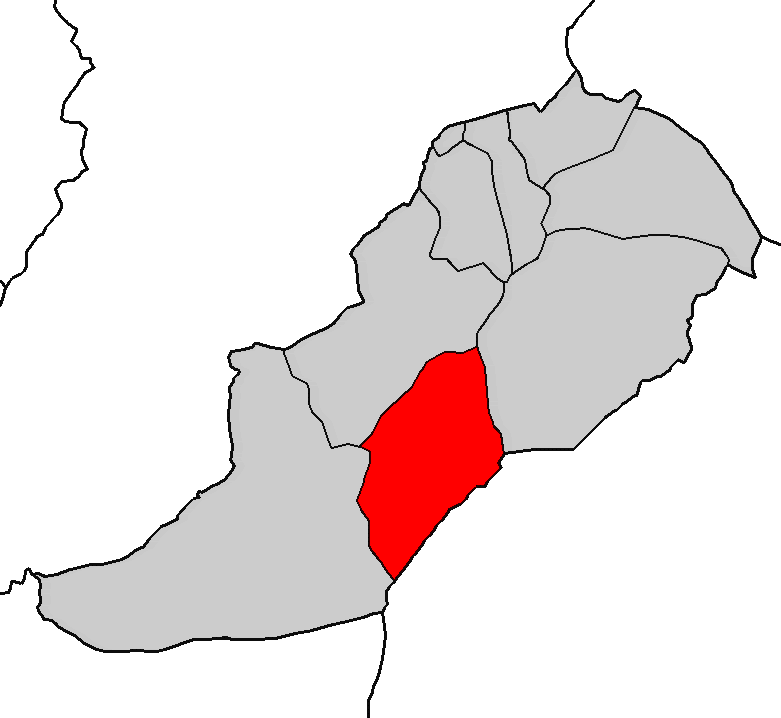 Situación da parroquia das Oiras no concello de Alfoz